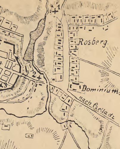 Ausschnitt einer Karte Beuthens aus dem Jahr 1800 mit Roßberg (Rosberg).